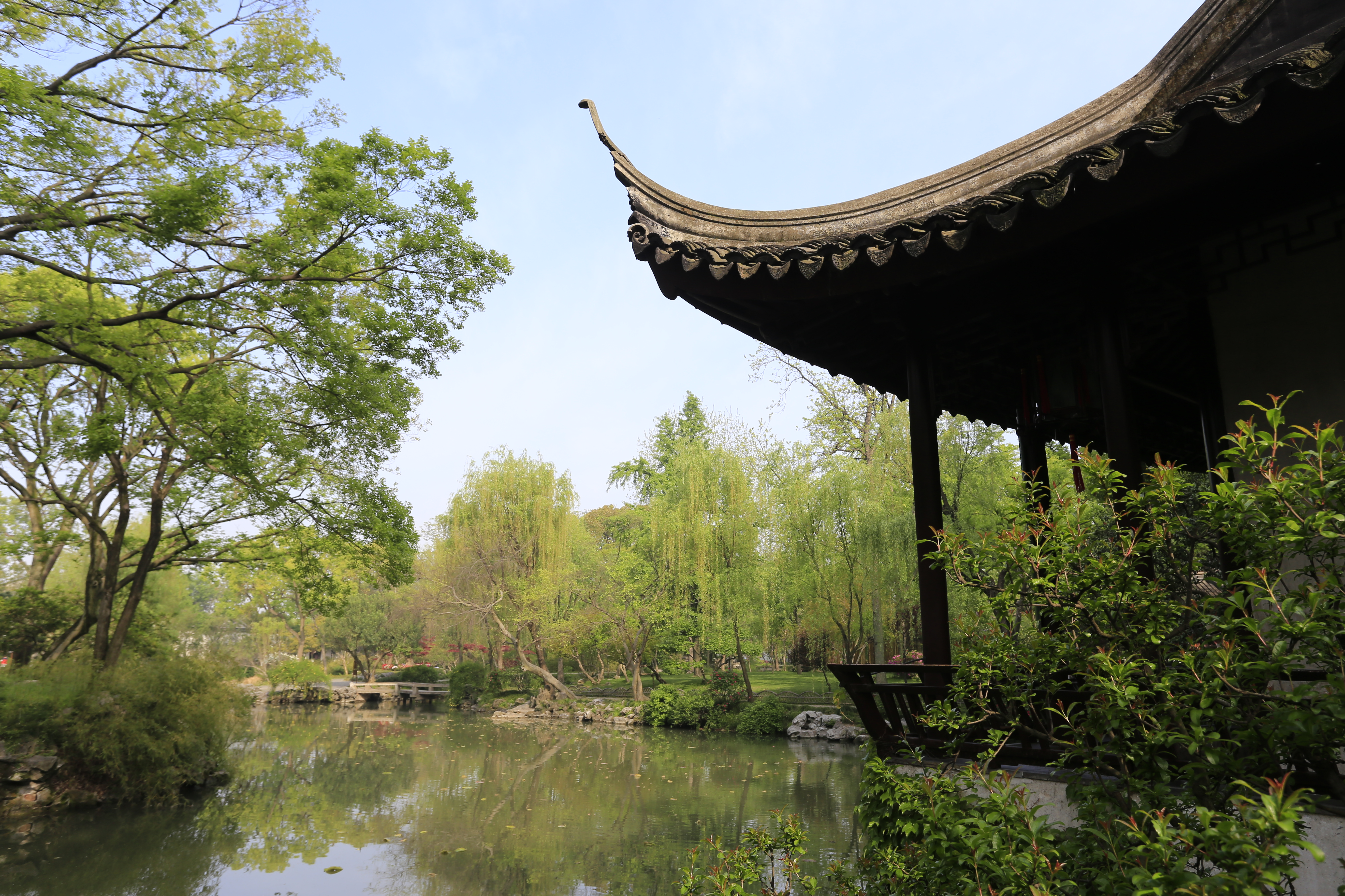 苏州拙政园—— 东部（归田园居）芙蓉榭